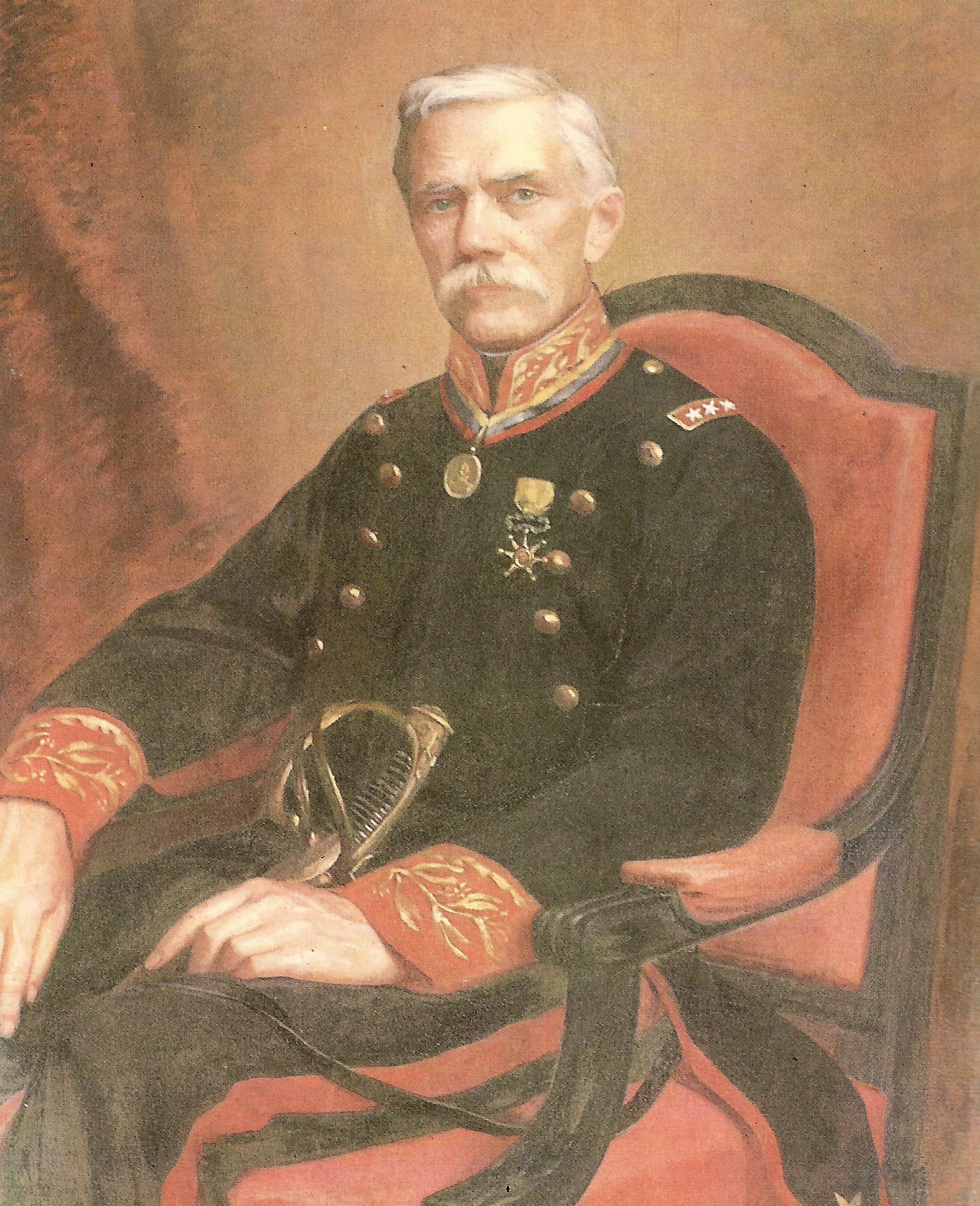 Emilio Mauri: Retrato del General Bartolomé Salom. (1780-1863) Oleo/tela colección del Palacio Federal Legislativo. Caracas _ Venezuela